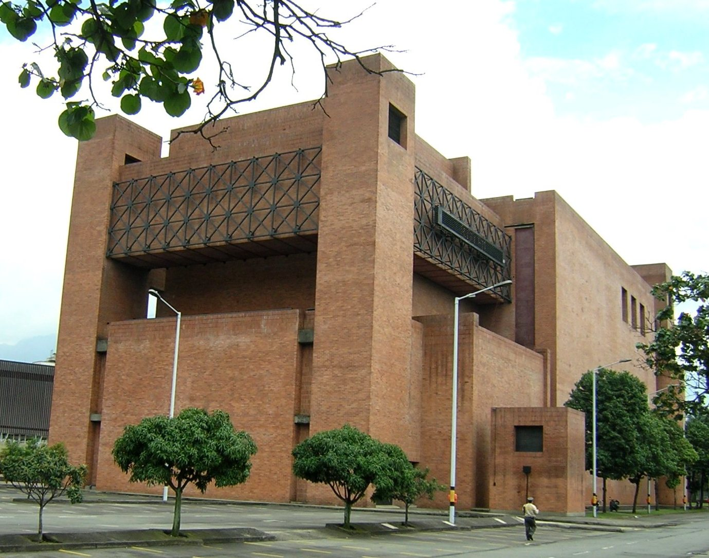 Teatro Metropolitano de Medellín, Colombia